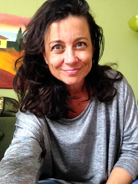 Auteur schrijfster Suzanne Buis, author, writer from The Netherlands